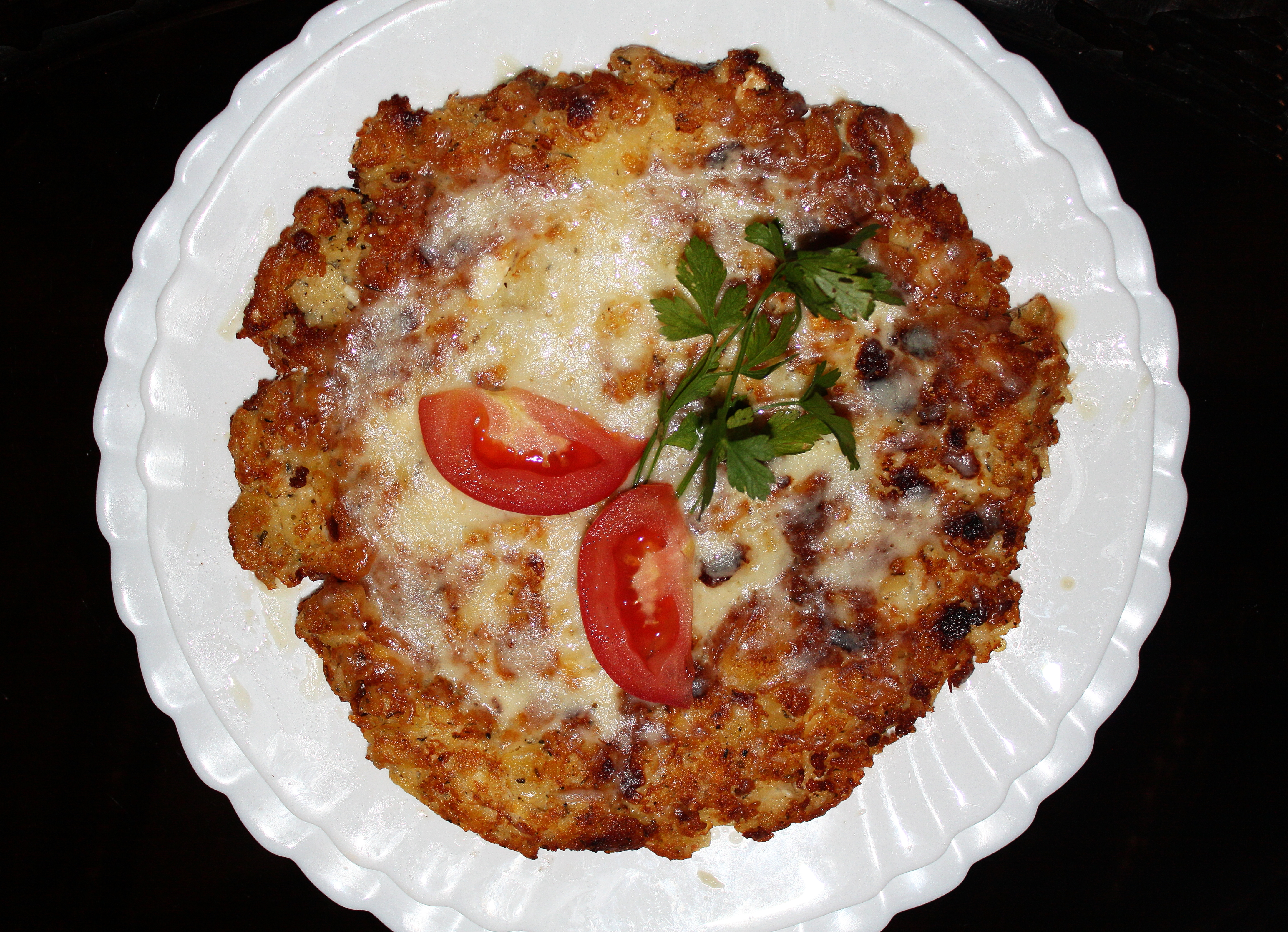 Patatnik, eine typische Speise in der Region der Rhodopen; ähnelt einem Kartoffelpuffer mit größeren und kleineren Kartoffelstückchen, die wie ein Pfannkuchen verbacken werden